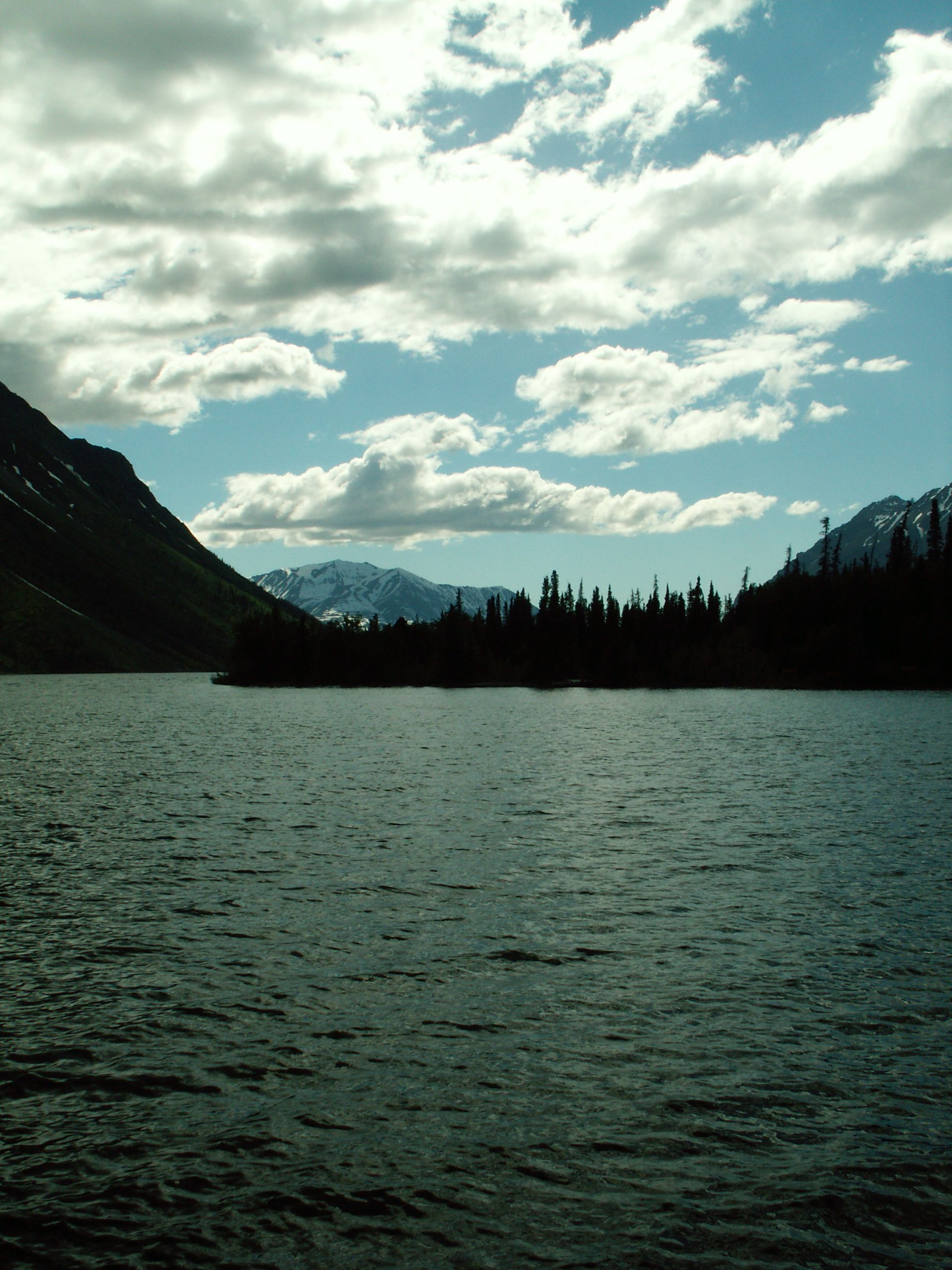 Kathleen Lake Yukon Canada